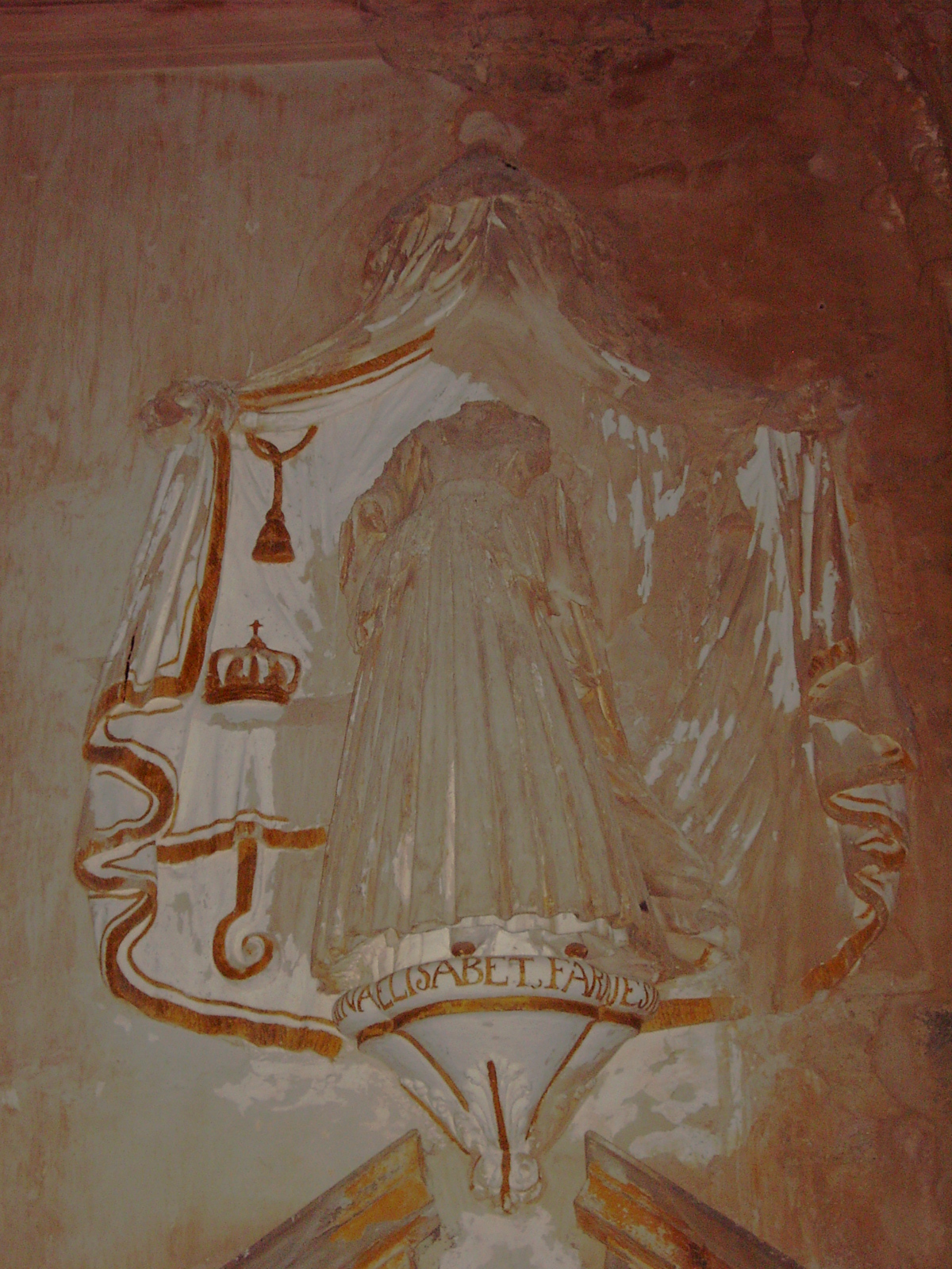 Escultura de escayola de la reina Isabel de Farnesio, esposa de Felipe V, en el monasterio de San Victorián.